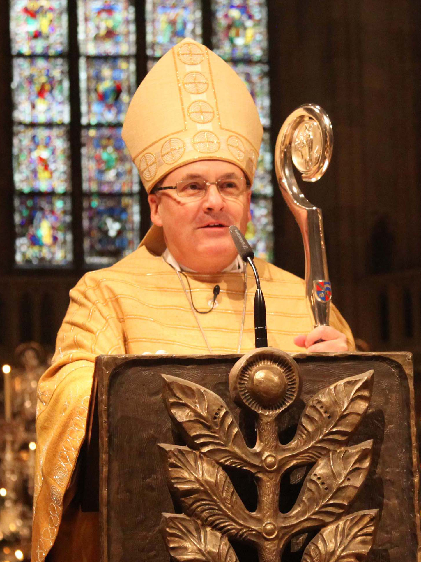 Bischof Dr. Rudolf Voderholzer am 25.12.2014 im Dom zu Regensburg